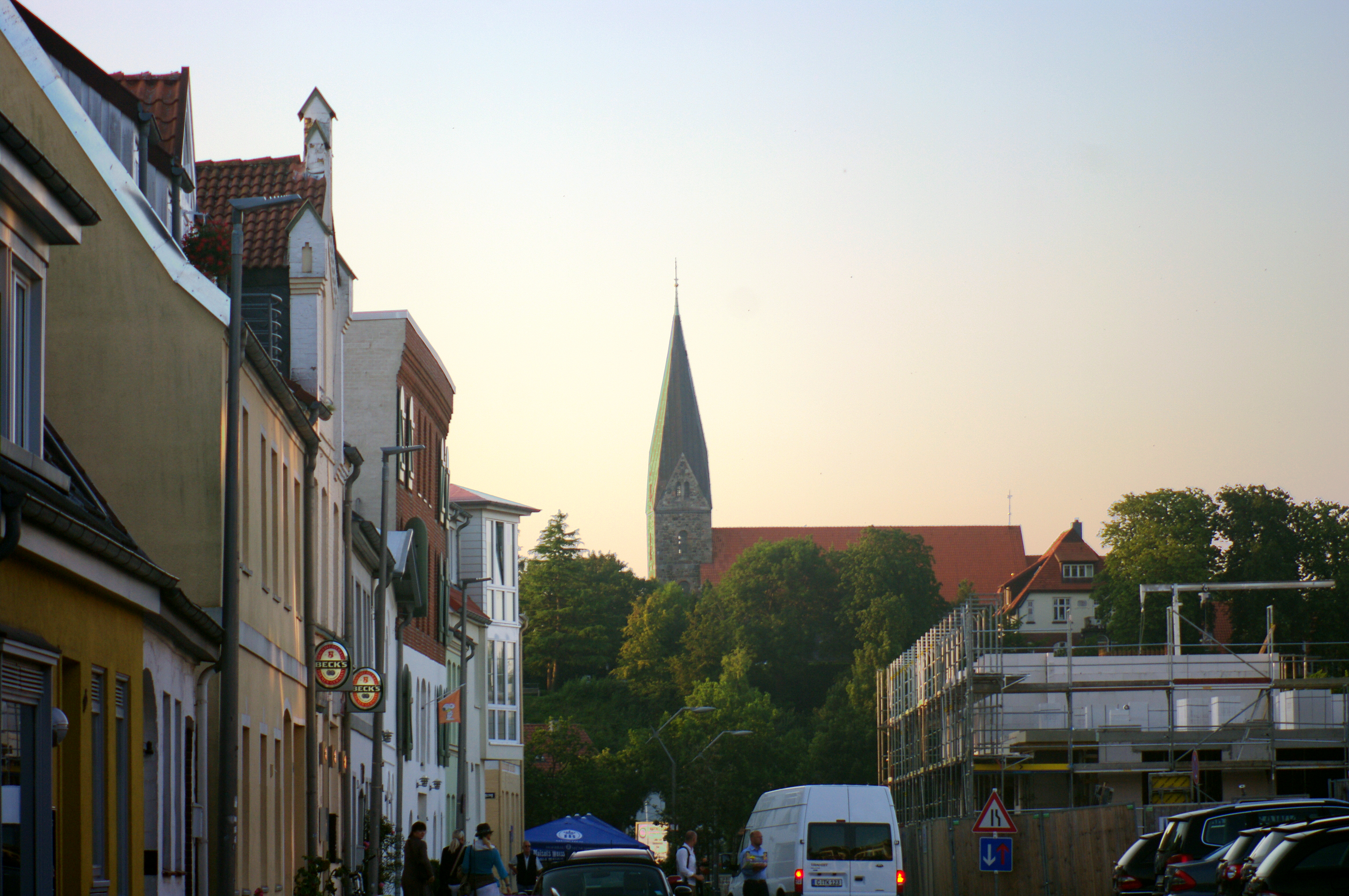 Borbyer Kirche aus Süd.